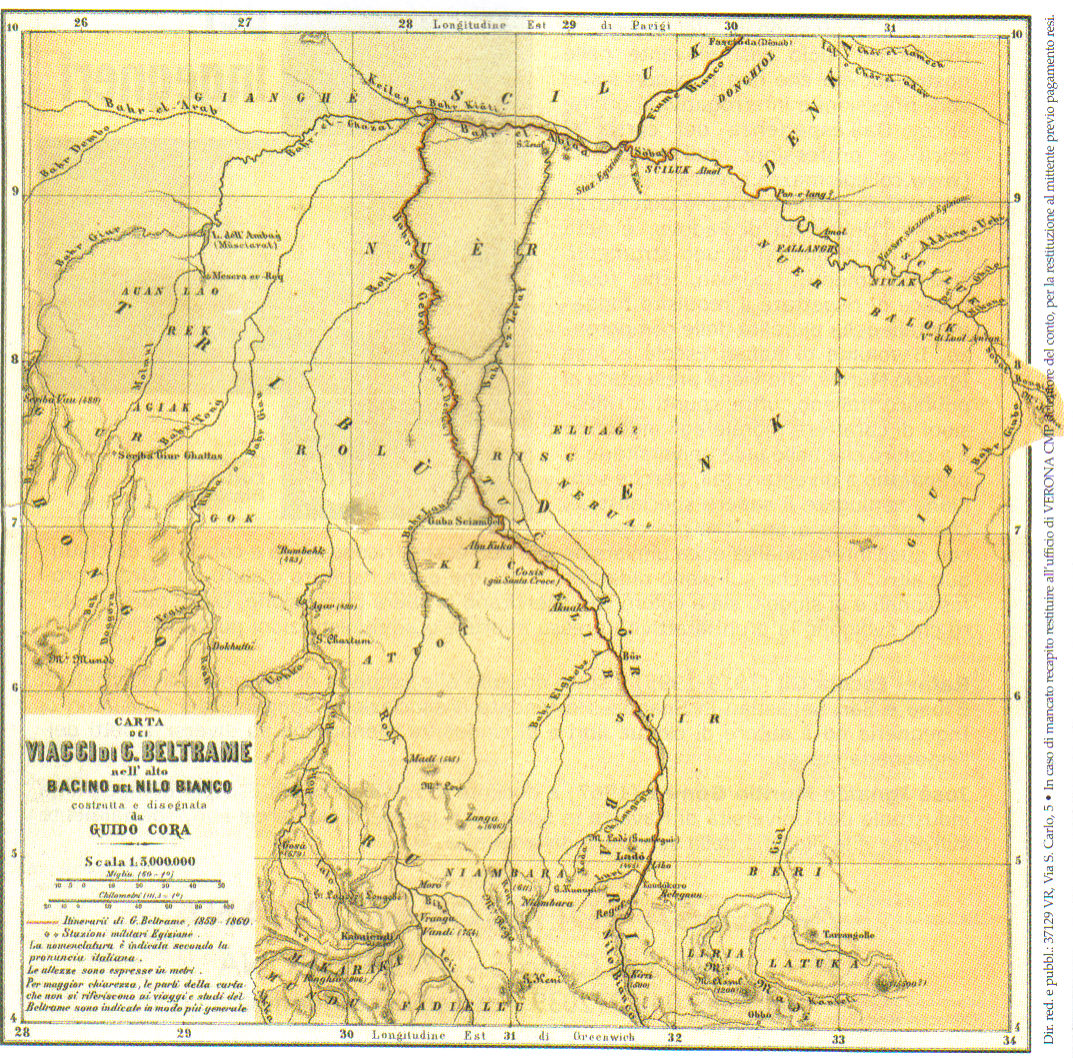 Beltrame's travels 1859 - 1865